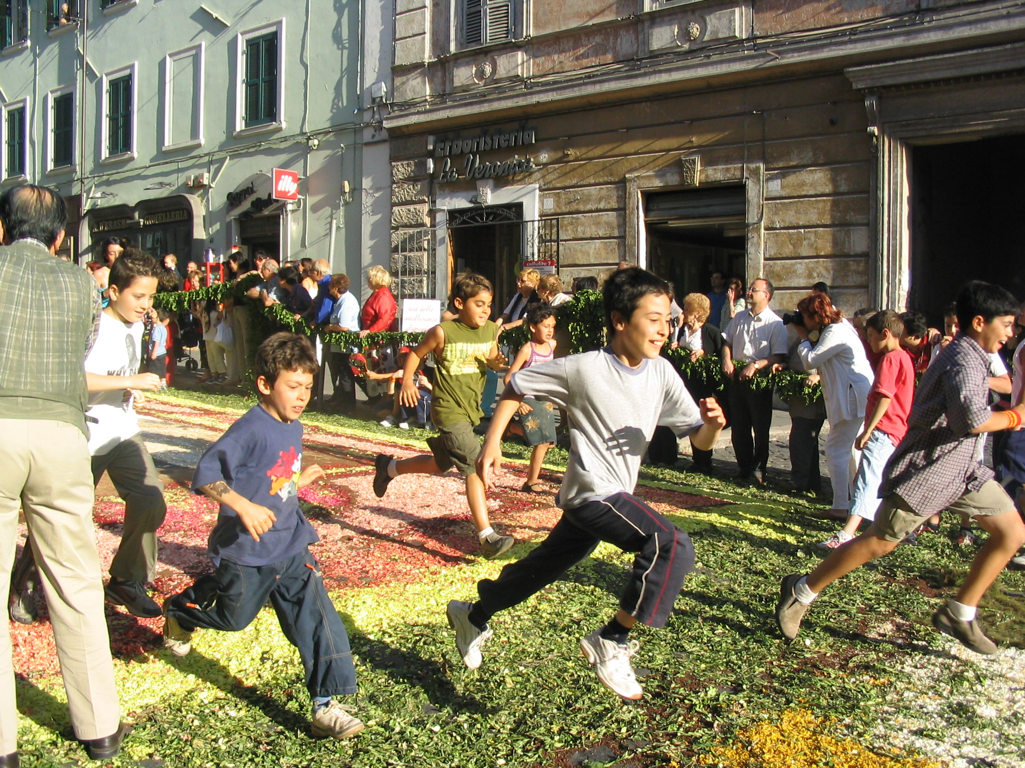 Genzano di Roma, Infiorata, Spallamento